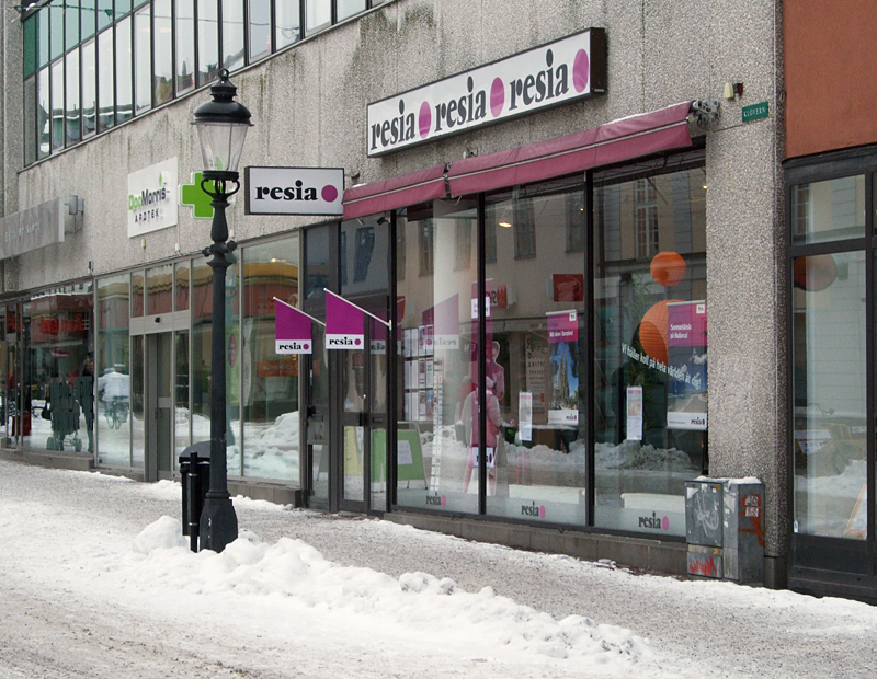 Resia Resebyrå i Nyköping, februari 2011